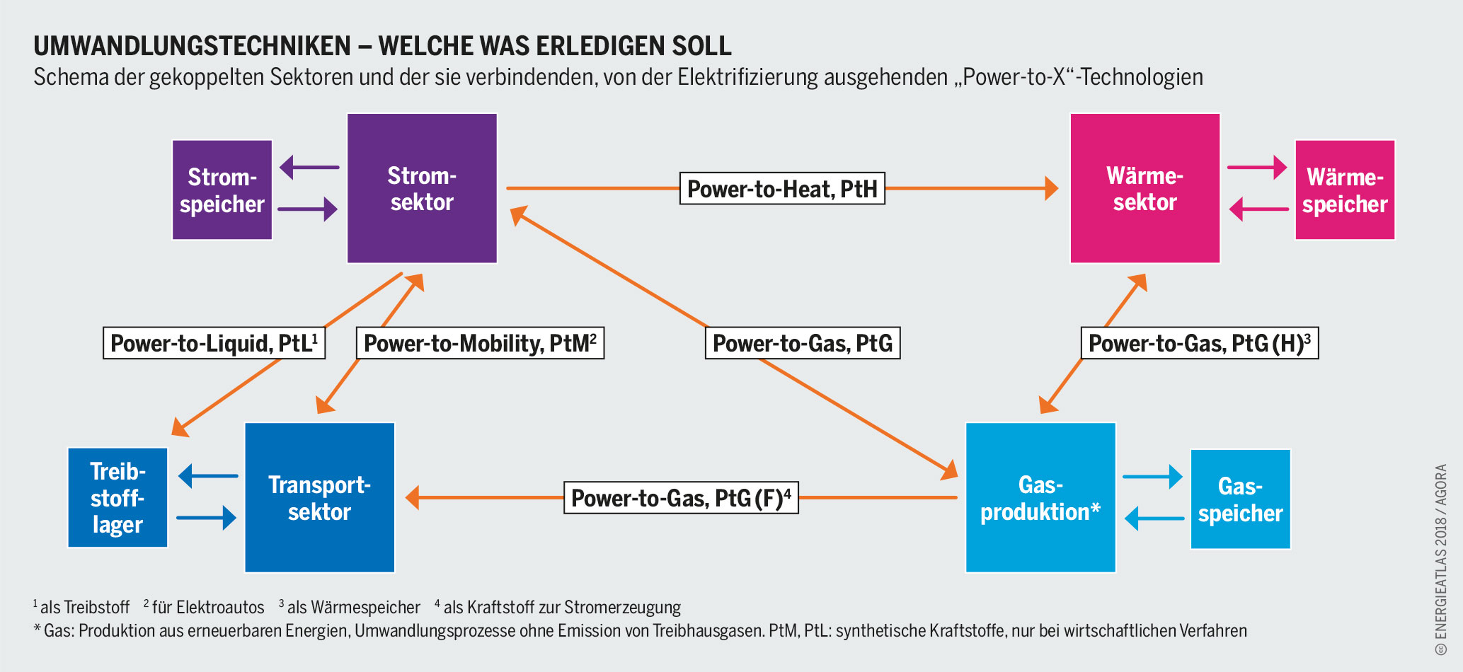 Sektorkopplung und Funktion von Power-to-X-Technologien